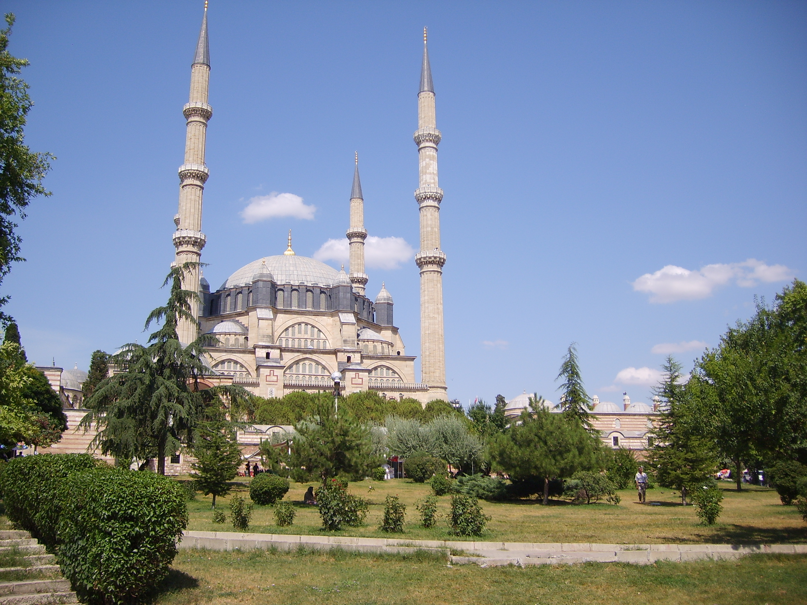 Selimiye...